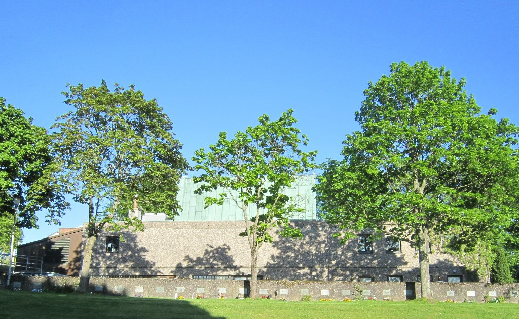 Sarpsborg kapell og krematorium på St. Olavs gravlund i Sarpsborg